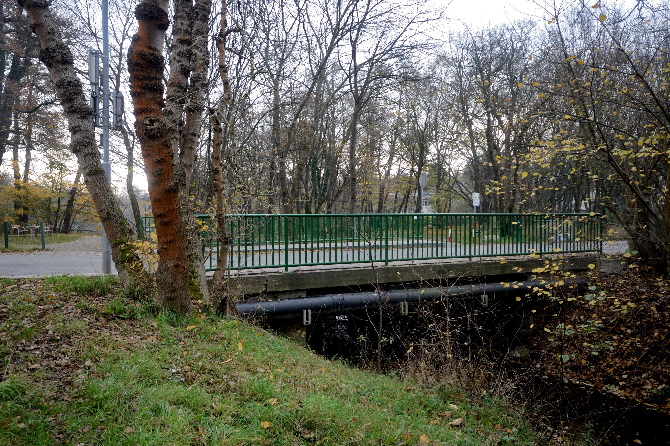 Treumannbrücke, Objekt B133700